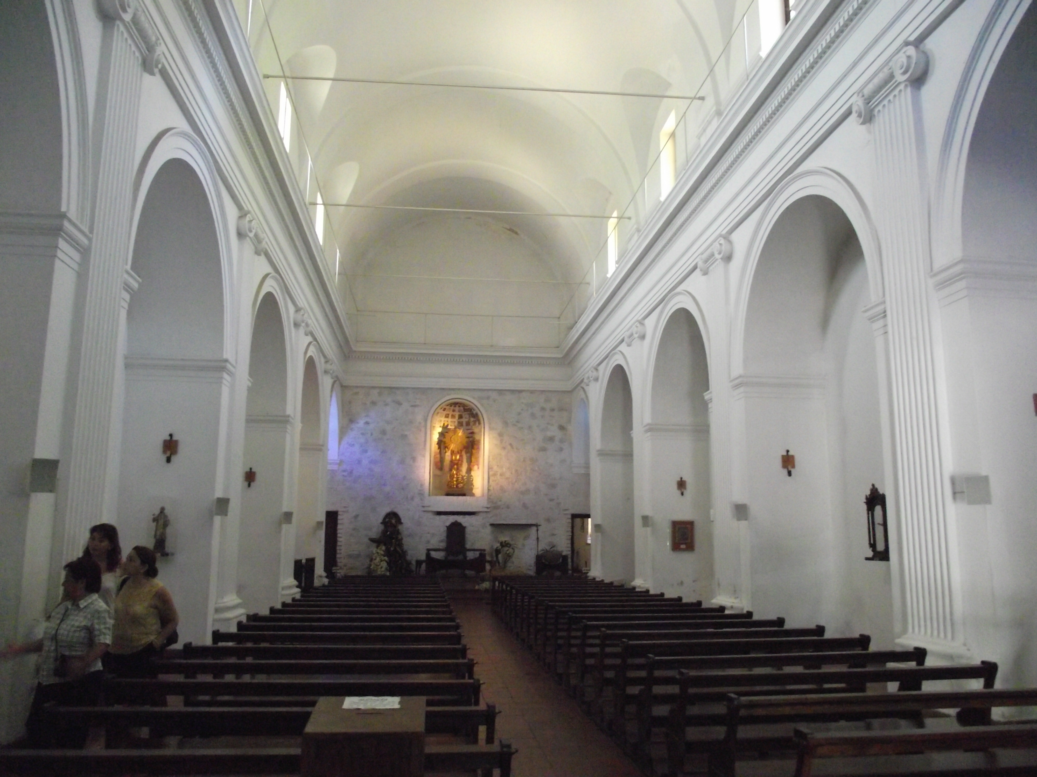 Iglesia Congregación Hija Misericordia. Ubicada en el departamento de Colonia